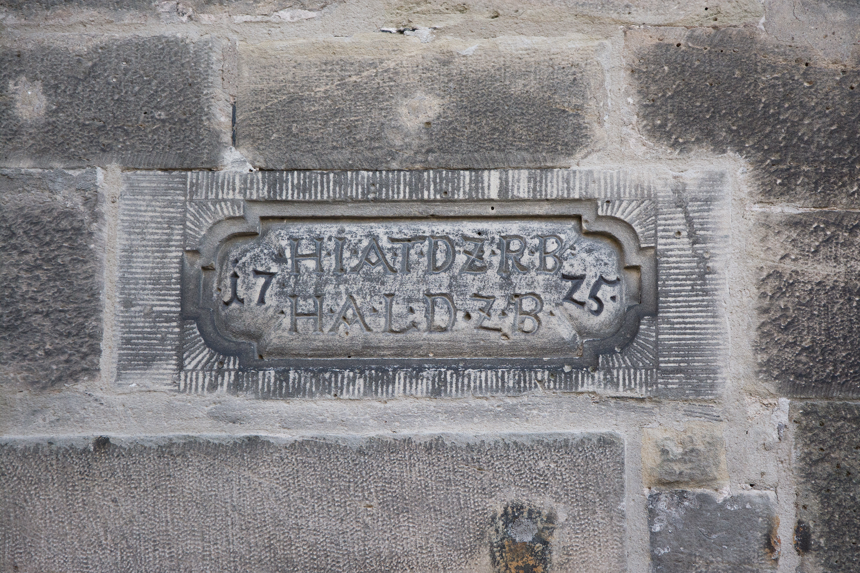 Inschriftstein an der Nordseite des Gebäudes Am Pförtchen 5 in Kronach. Die von der Jahreszahl 1725 umrahmte Inschrift lautet: “H.I.A.T.D.Z.R.B. H.A.L.D.Z.B.” Die Initialen stehen für: “Herr Johann Andreas Tribl, derzeit regierender Bürgermeister Herr Andreas Lohnmüller, derzeit Baumeister”